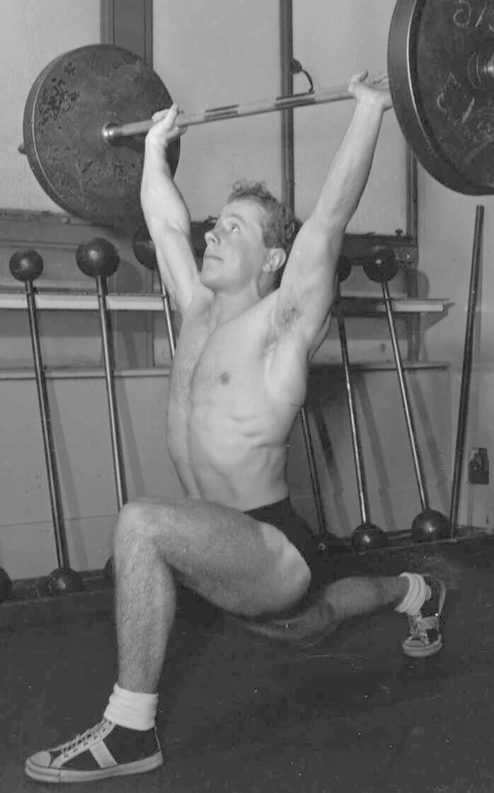 Vern Barbaris